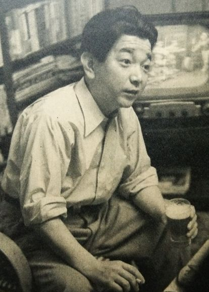 西川辰美